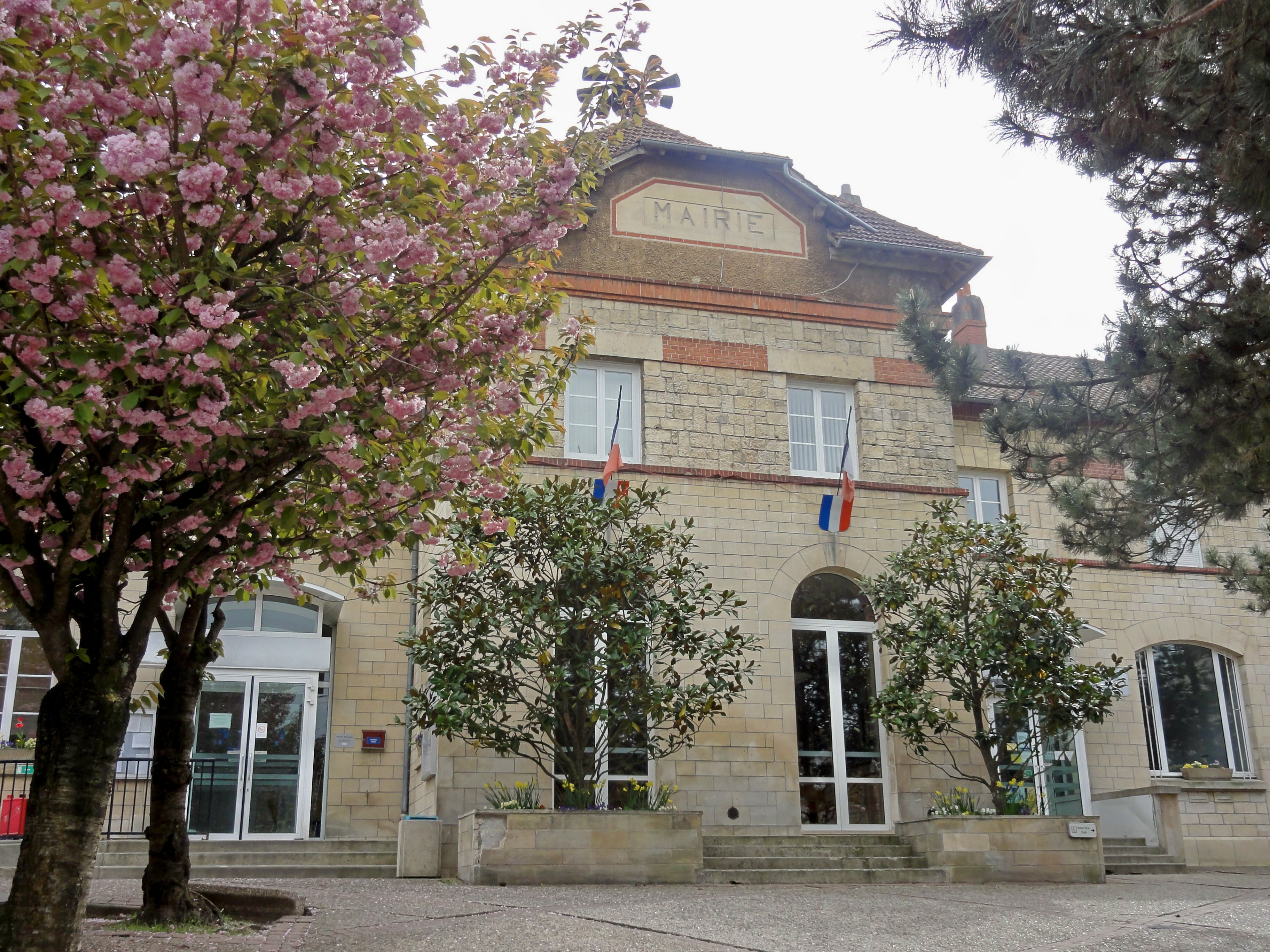 La mairie.